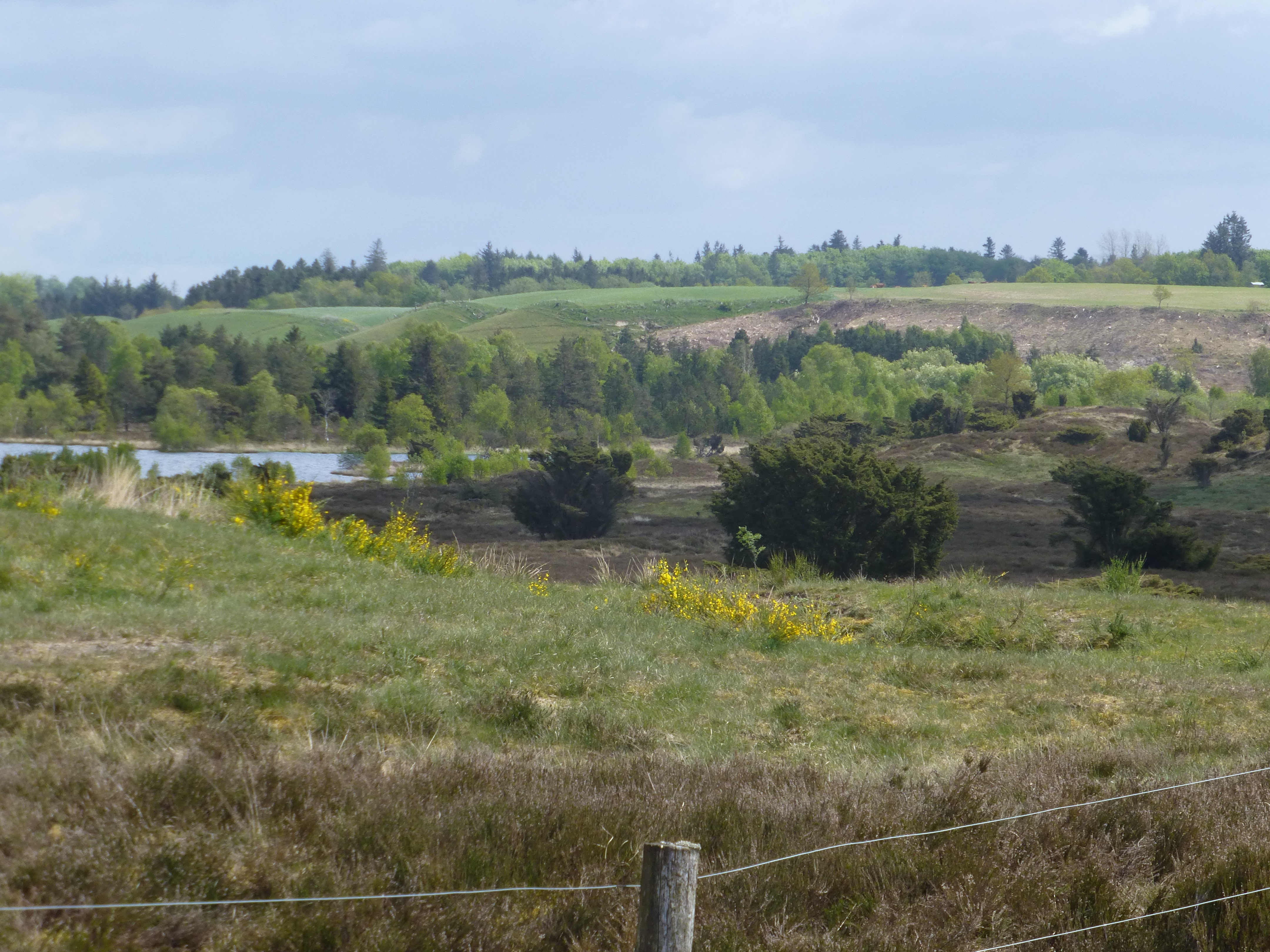 Vrads Sande set mod øst fra Hjøllundvej